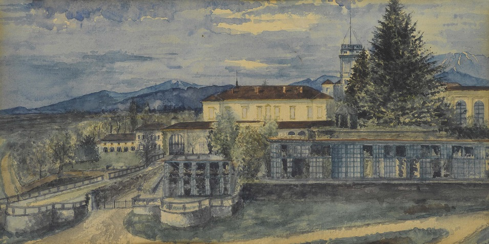 Villa del Gernetto a Lesmo, acquerello su carta, firmato, 18 x 31 cm., coll. privata